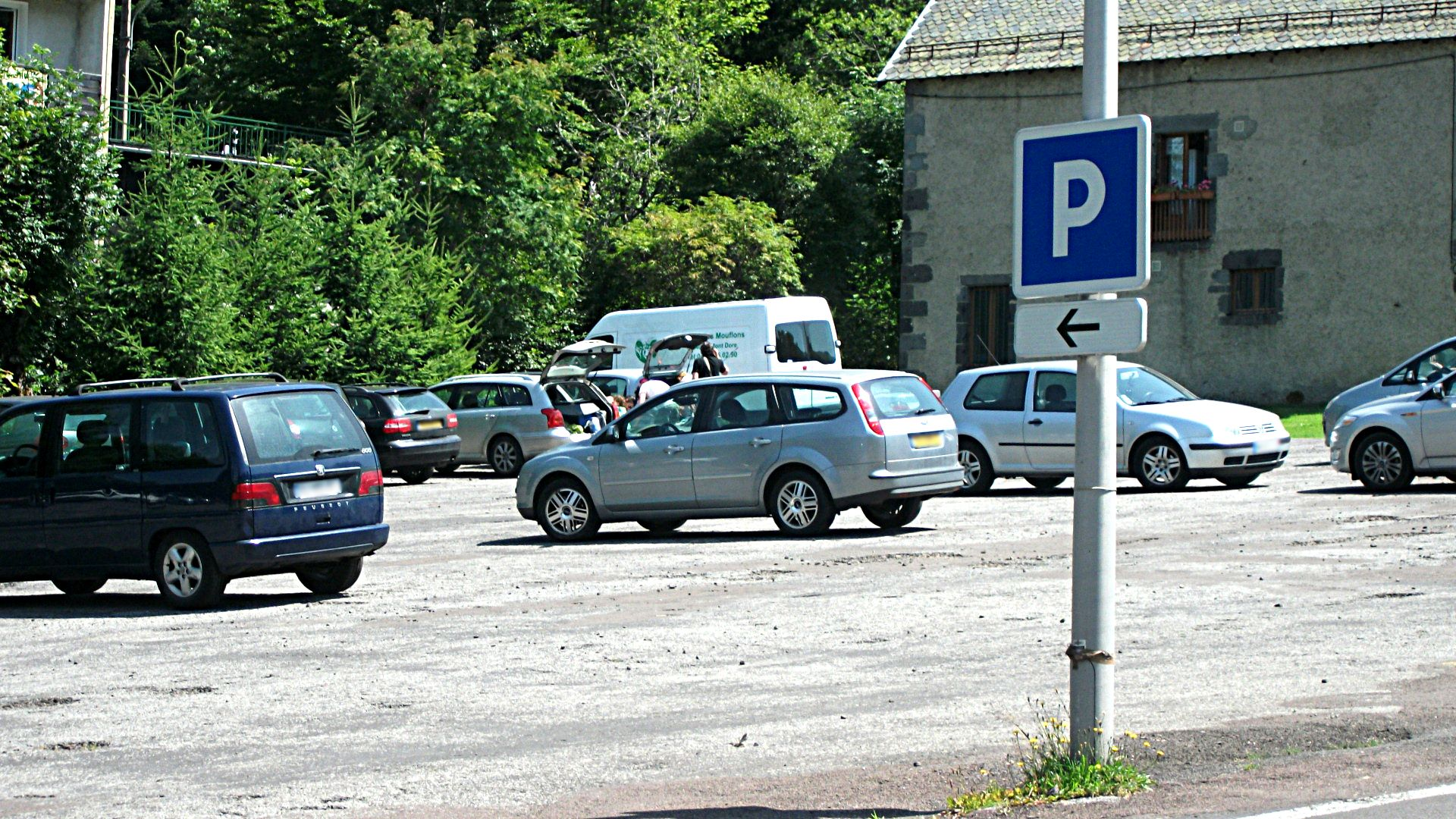 Un parking au Mont-Dore, il est situé près de la route d'accès au Sancy. Il est de plus signalé : C1 Parking : SES, 2008 M3b Direction à suivre, SES, 2009